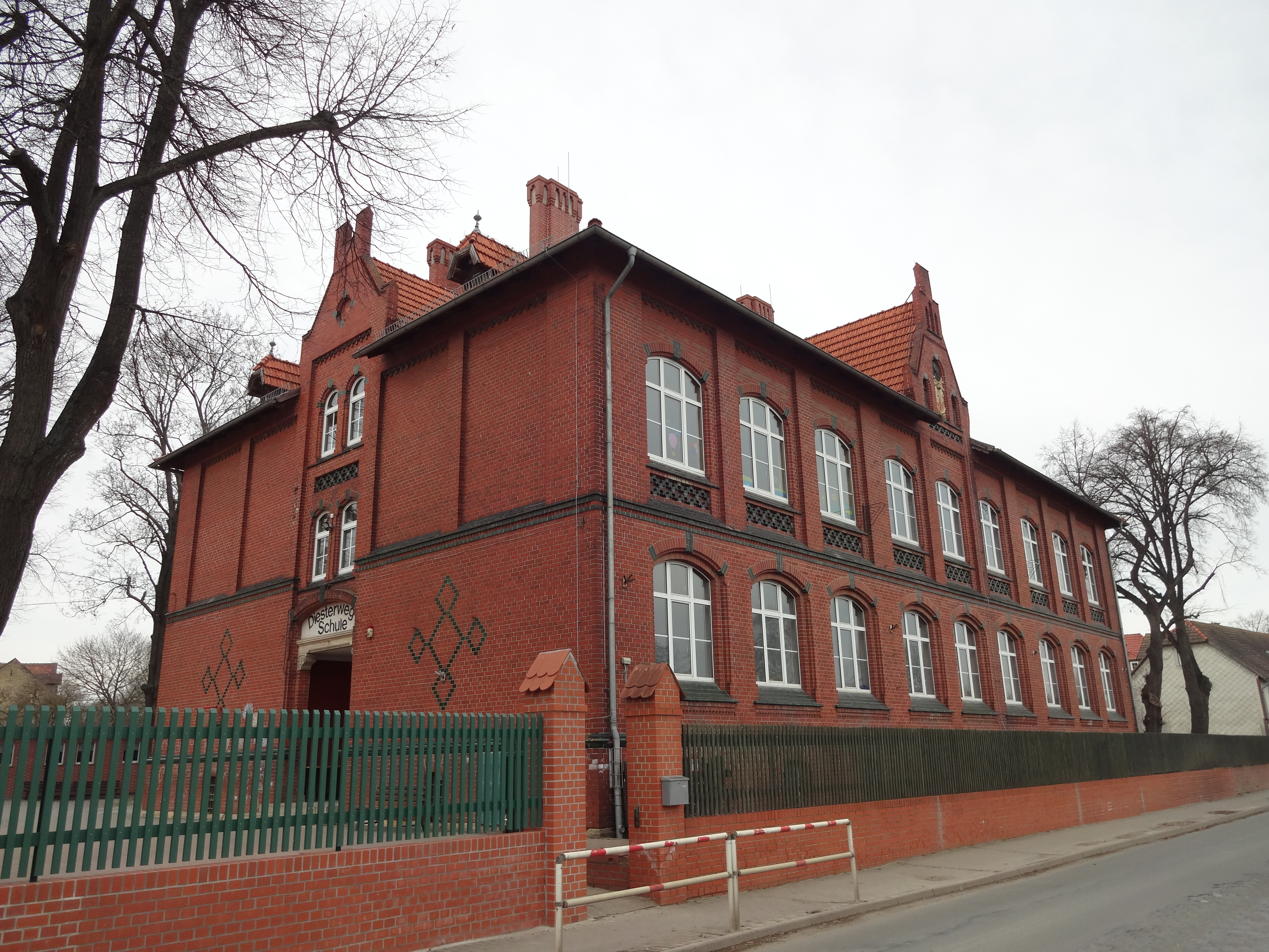 denkmalgeschützte Diesterwegschule in der Bleichstraße in Derenburg, Ortsteil von Blankenburg (Harz)